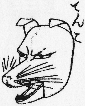 Tenko (天狐) from Hokusai Manga (北斎漫画)